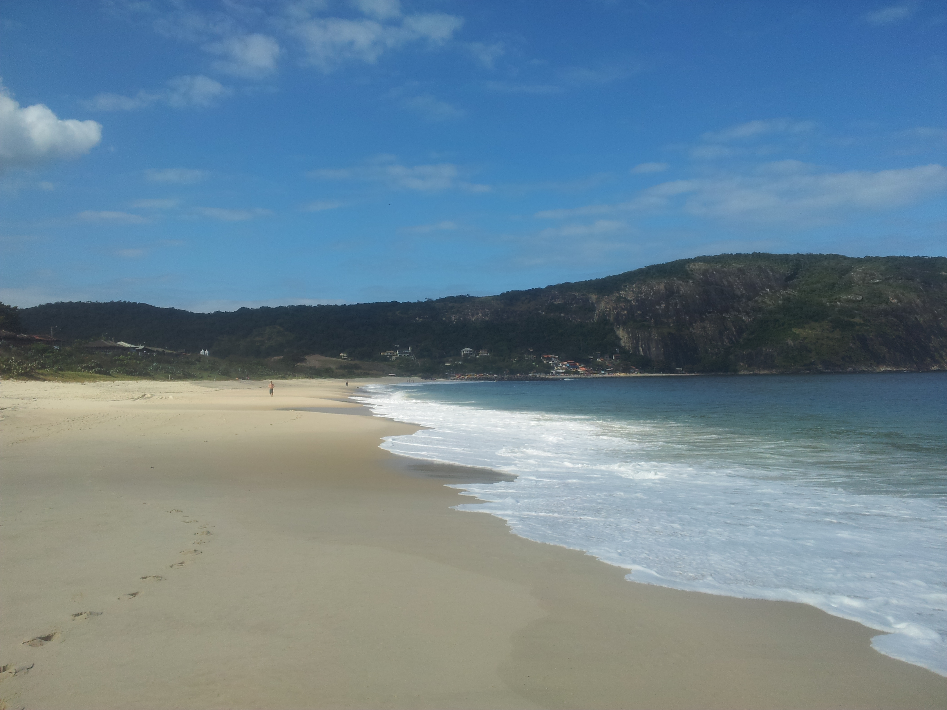 Praia de Camboinhas em Niteroi RJ